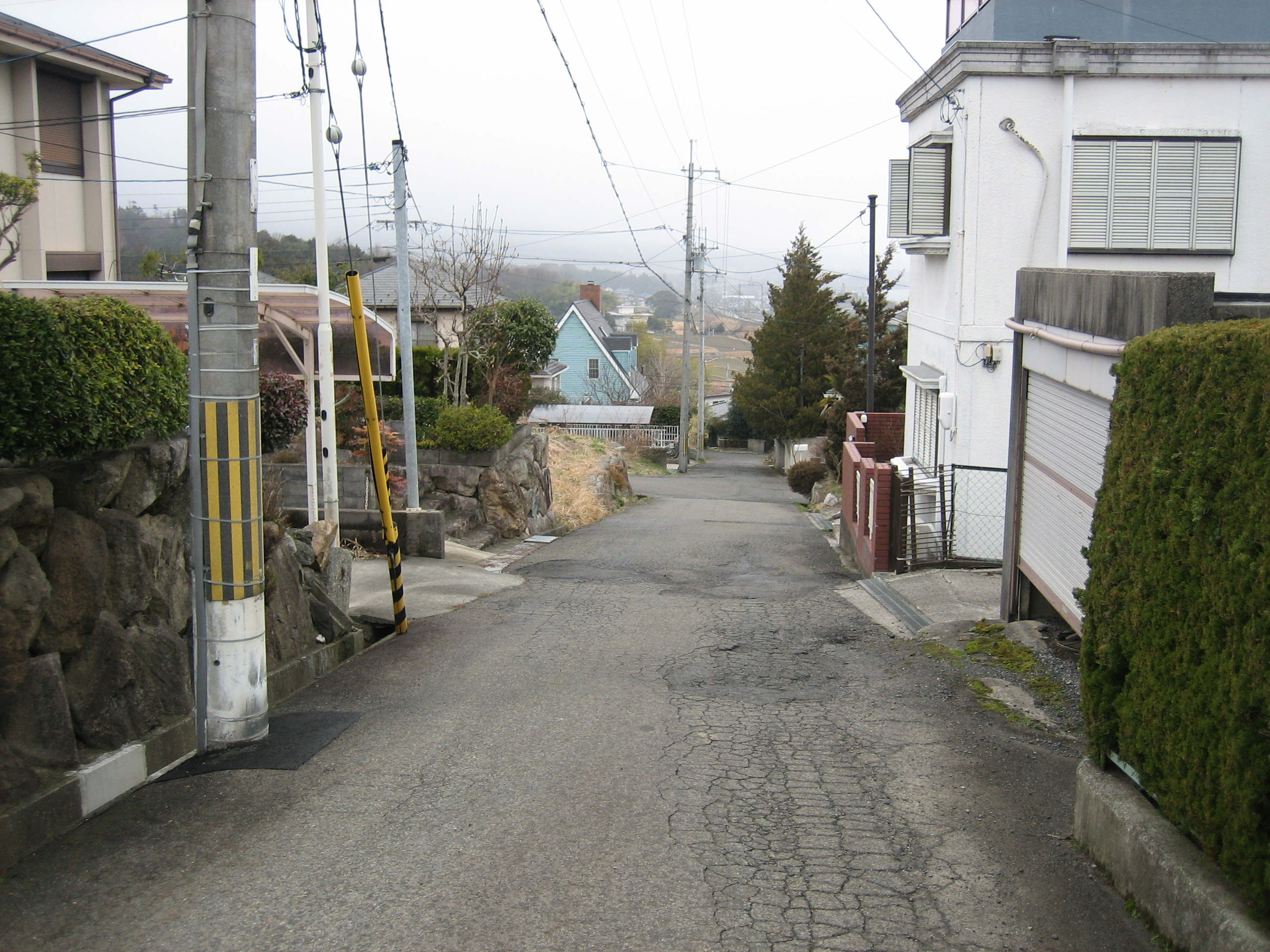 滋賀県大津市和邇北浜から住吉台地区内を撮影